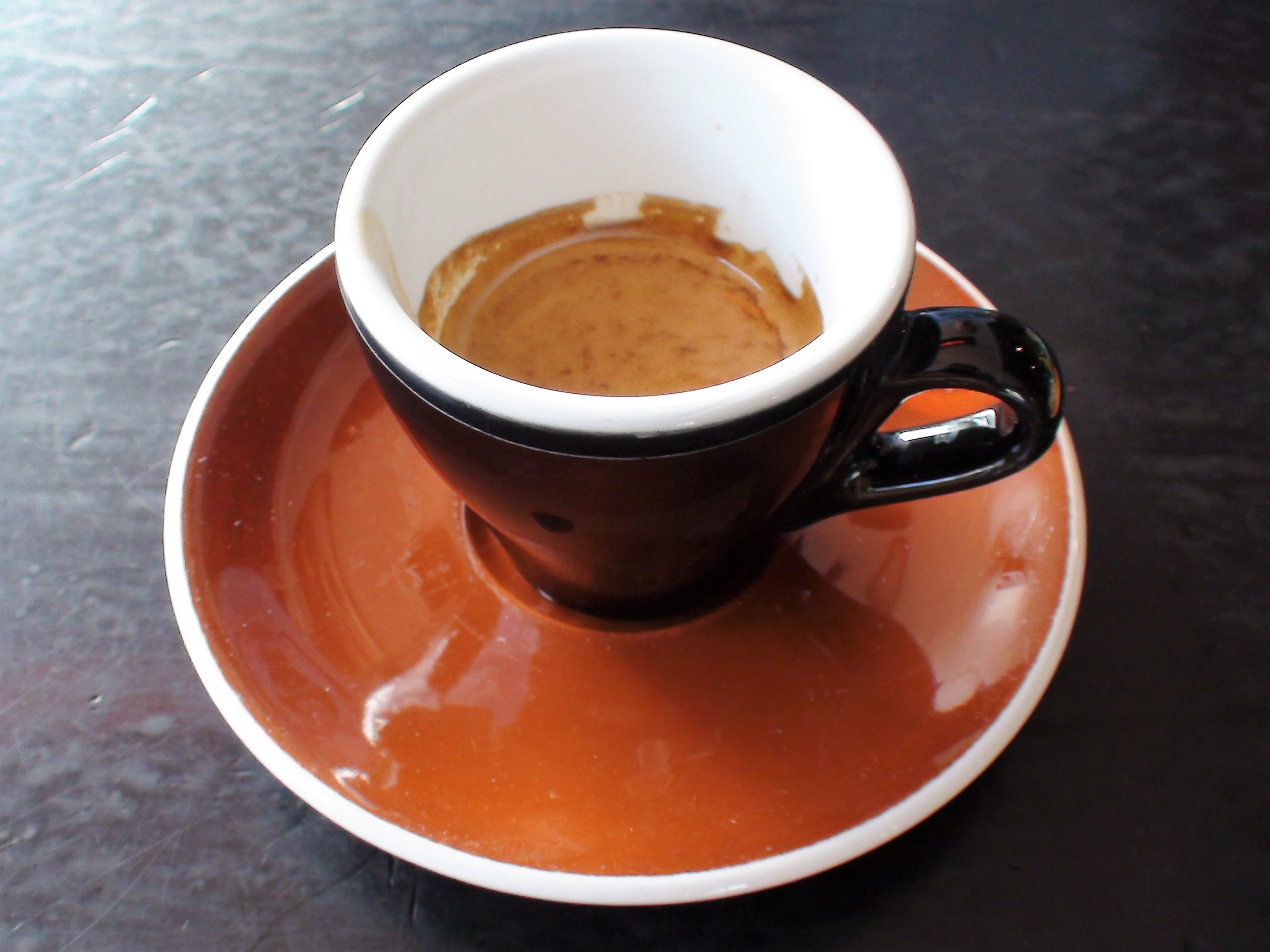 Typische, dickwandige Espressotasse (Obertasse, mit Untertasse) mit Espresso